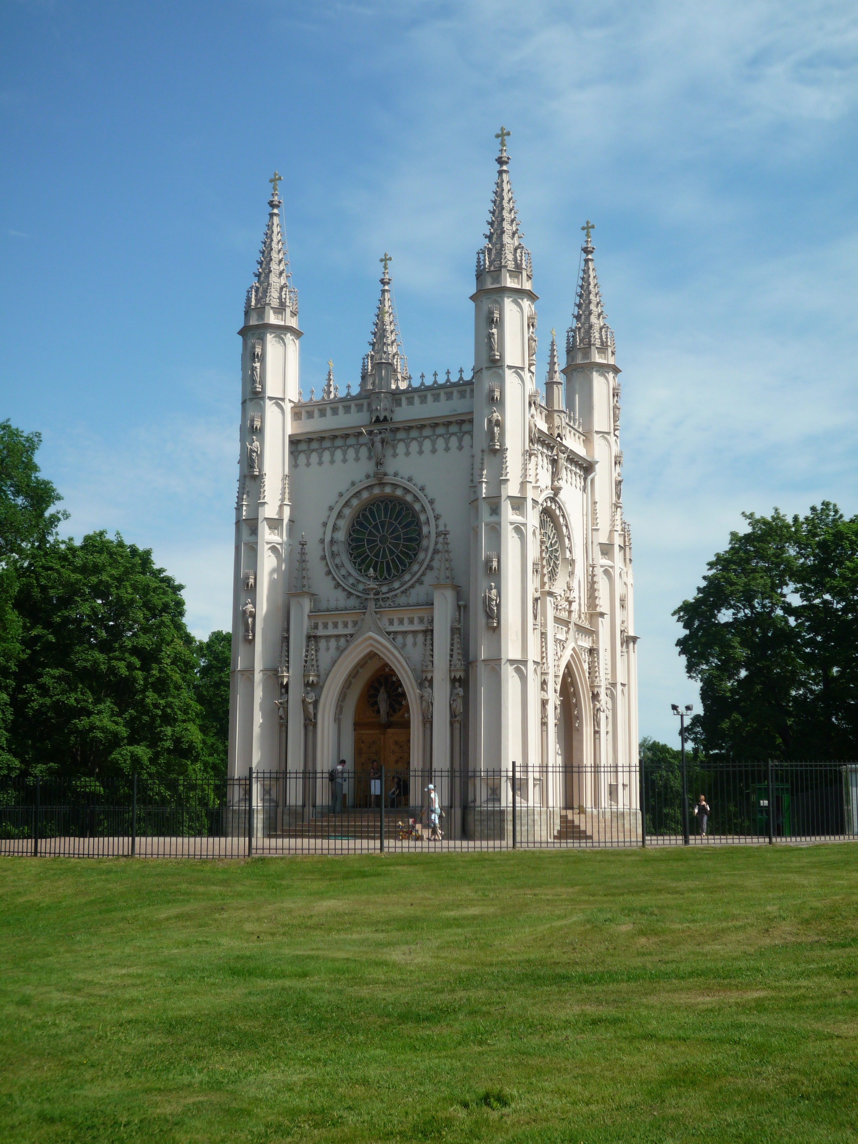 Церковь святого благоверного князя Александра Невского («Готическая капелла») в парке «Александрия», Петергоф